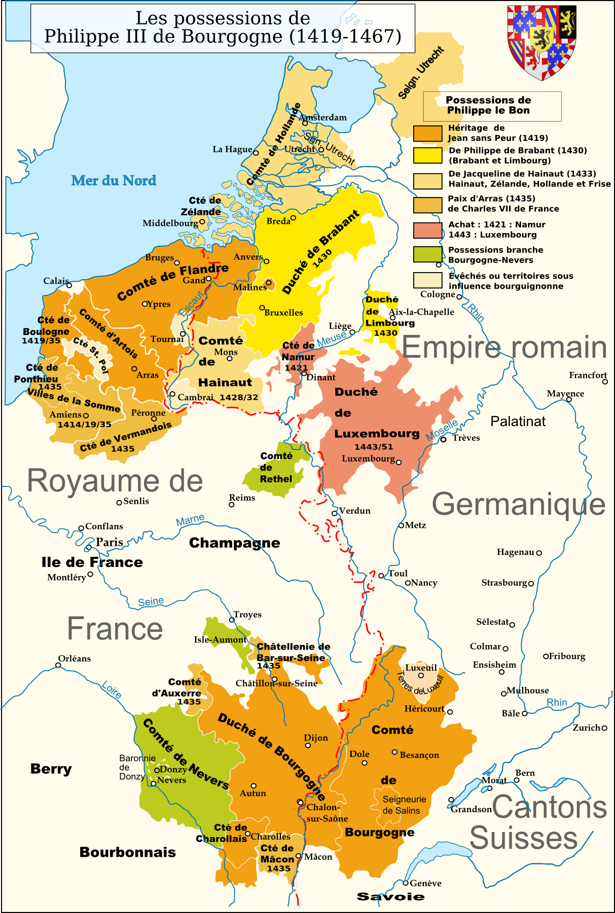 Das Herrschaftsgebiet des Hauses Burgund unter Philipp III dem Guten zwischen 1419 und 1469